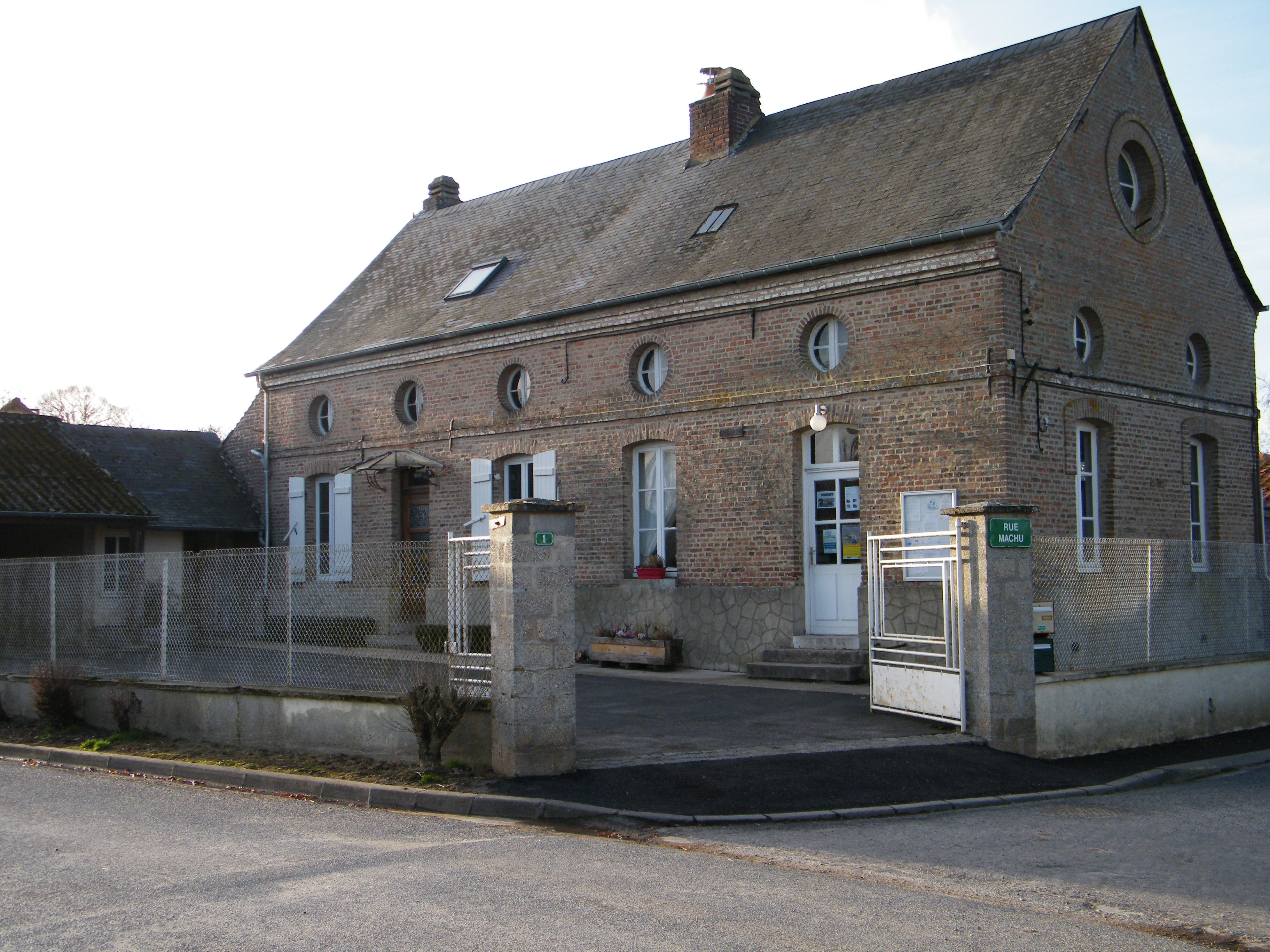 Grébault-Mesnil, Somme, Fr, mairie-école